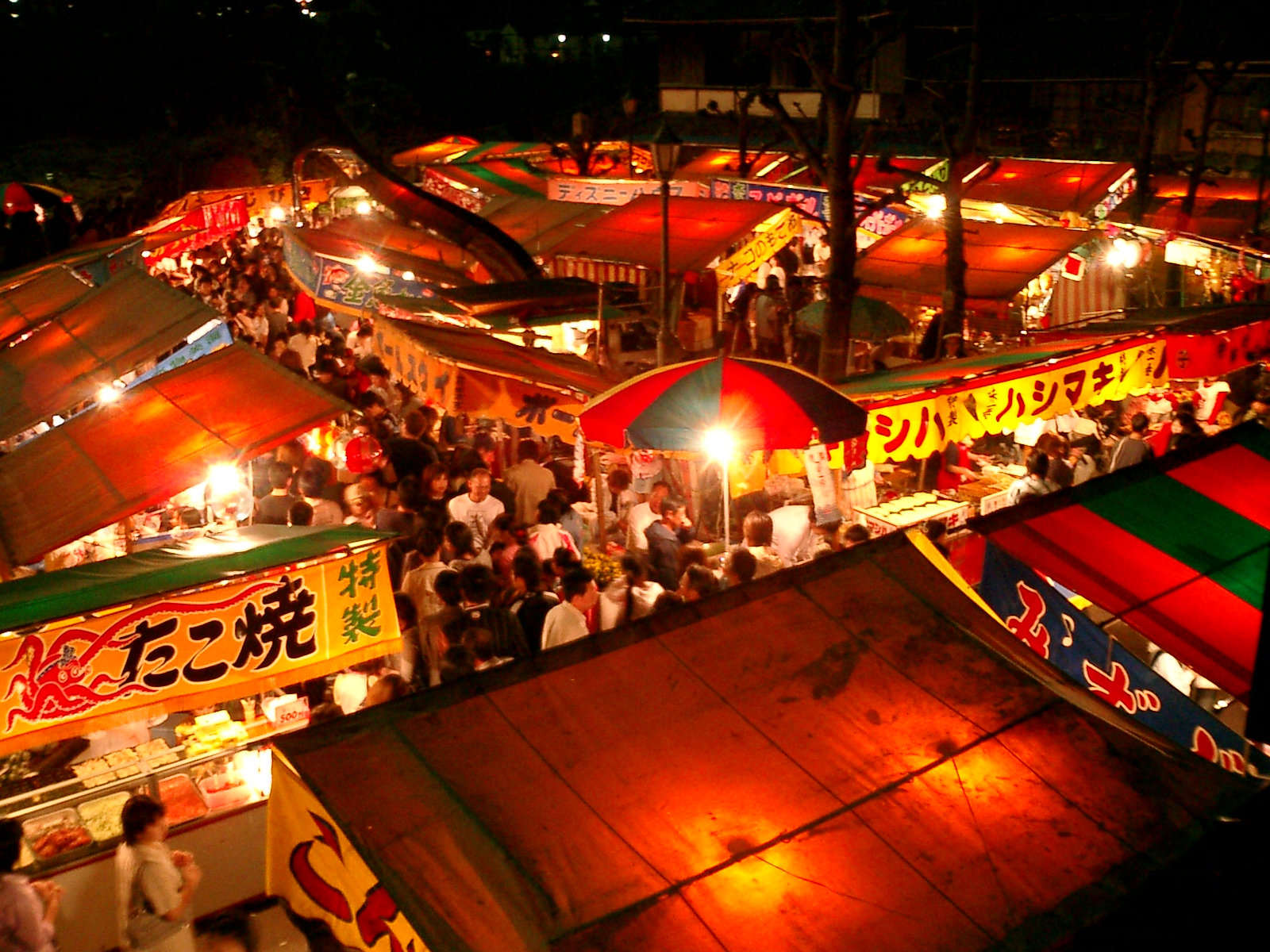 A stall at a fair(Hana-matsuri/Ayu-matsuri)